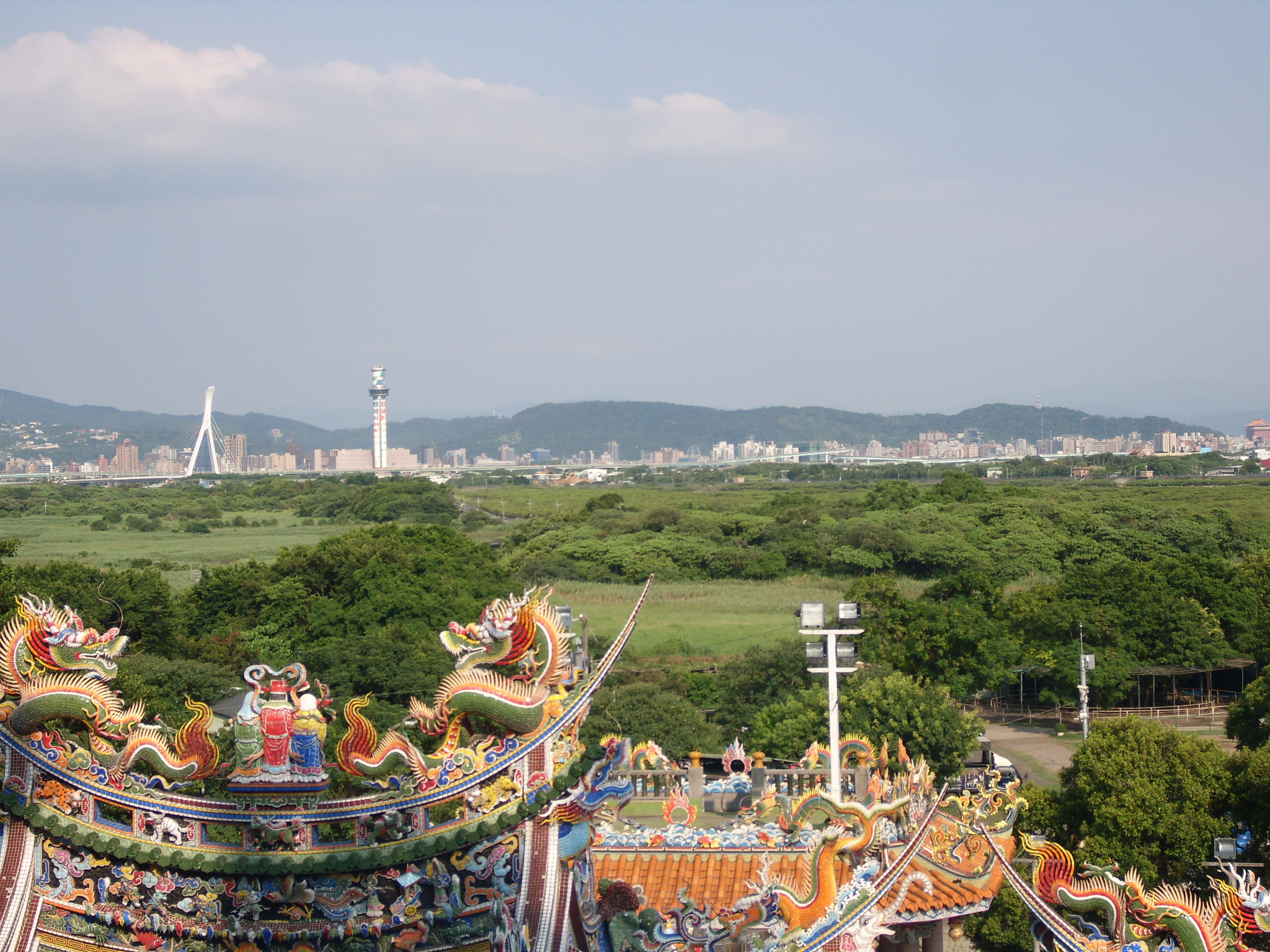 關渡宮前方的關渡自然公園（左）與關渡自然保留區（右）